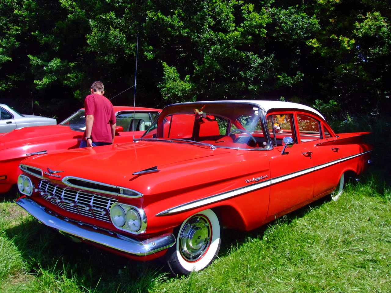 Quelle: selbst fotografiert, 06/2007 Fotograf: Späth Chr.